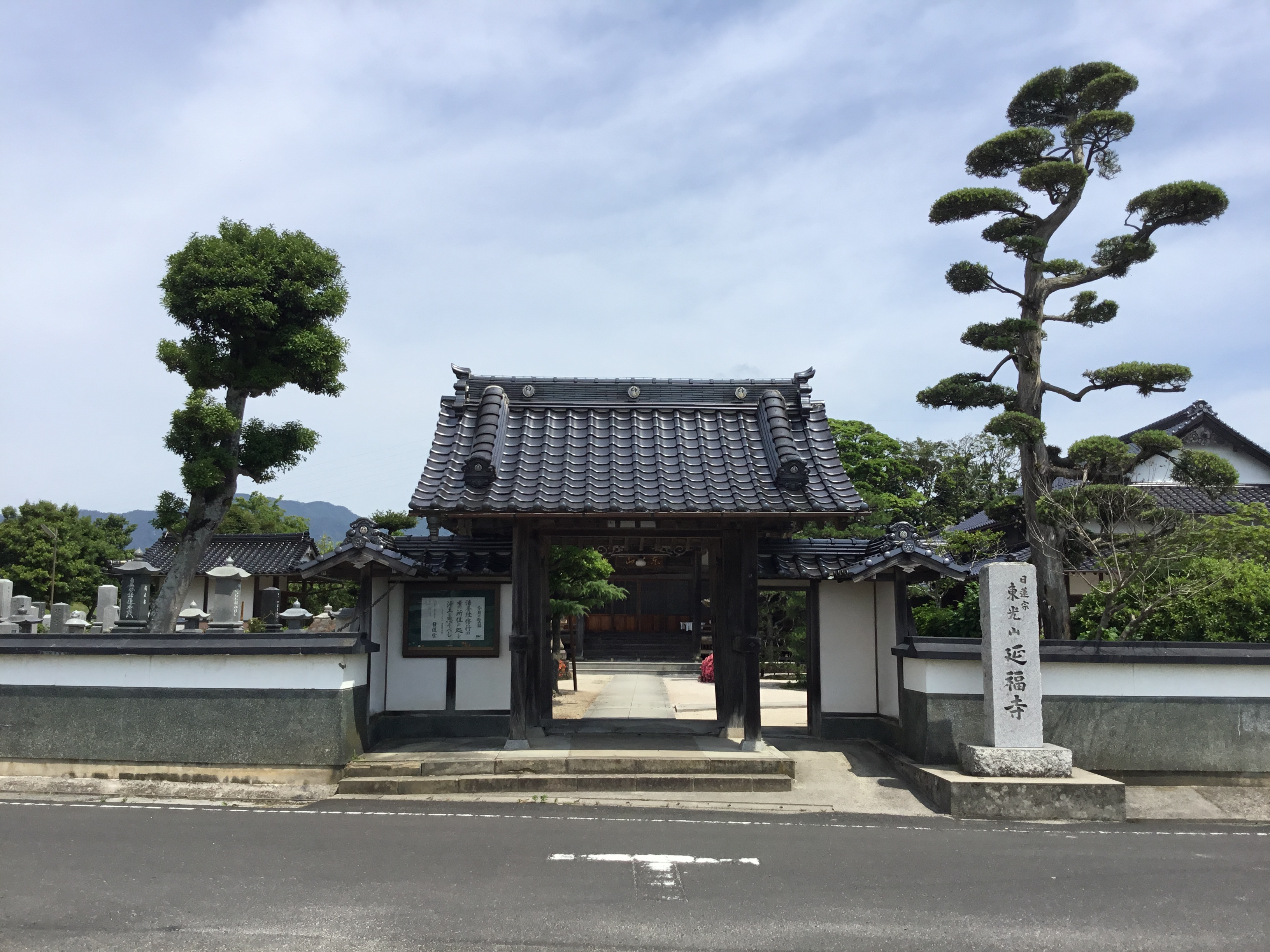 東光山延福寺